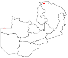 Lage von Kaputa in Sambia